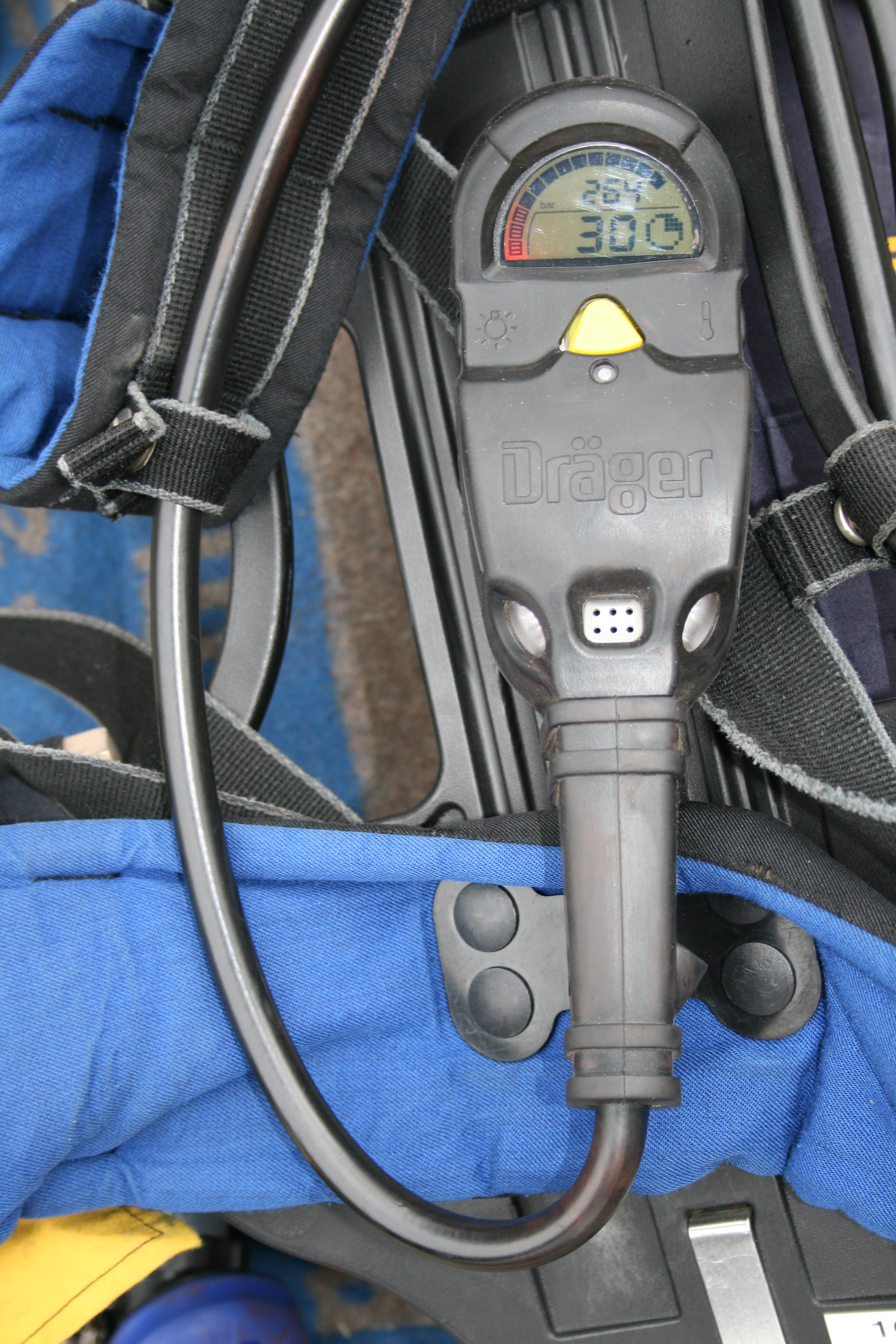 Totmanngeber der Firma Dräger